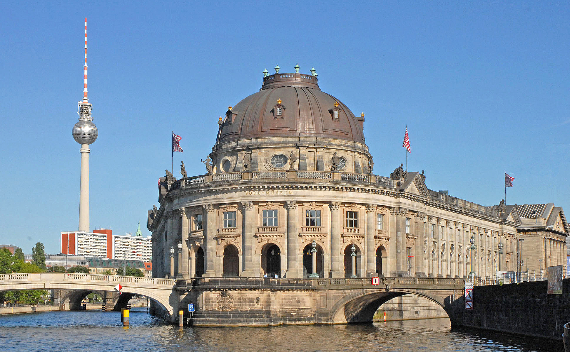 Frontseite des Bodemuseum, links die Monbijoubrücke, im Hintergrund der Fernsehturm